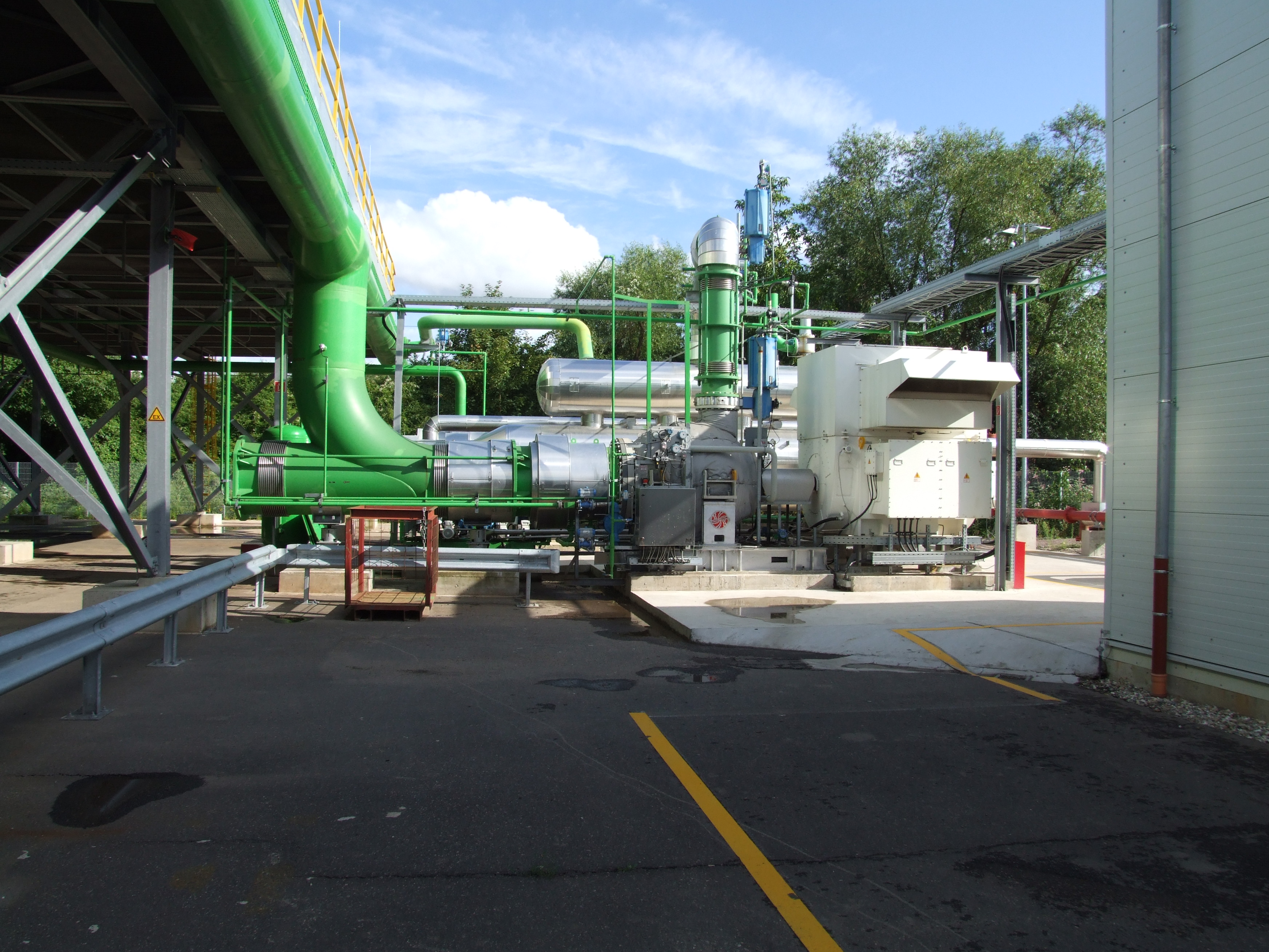 Turbinengeneratorsatz GKW Landau des Herstellers Ormat. In der Mitte die Turbine. Von oben strömt der Dampf ein. Rechts im weißen Blechkasten der Generator. Links strömt der Dampf hoch zum Trockenkühler.